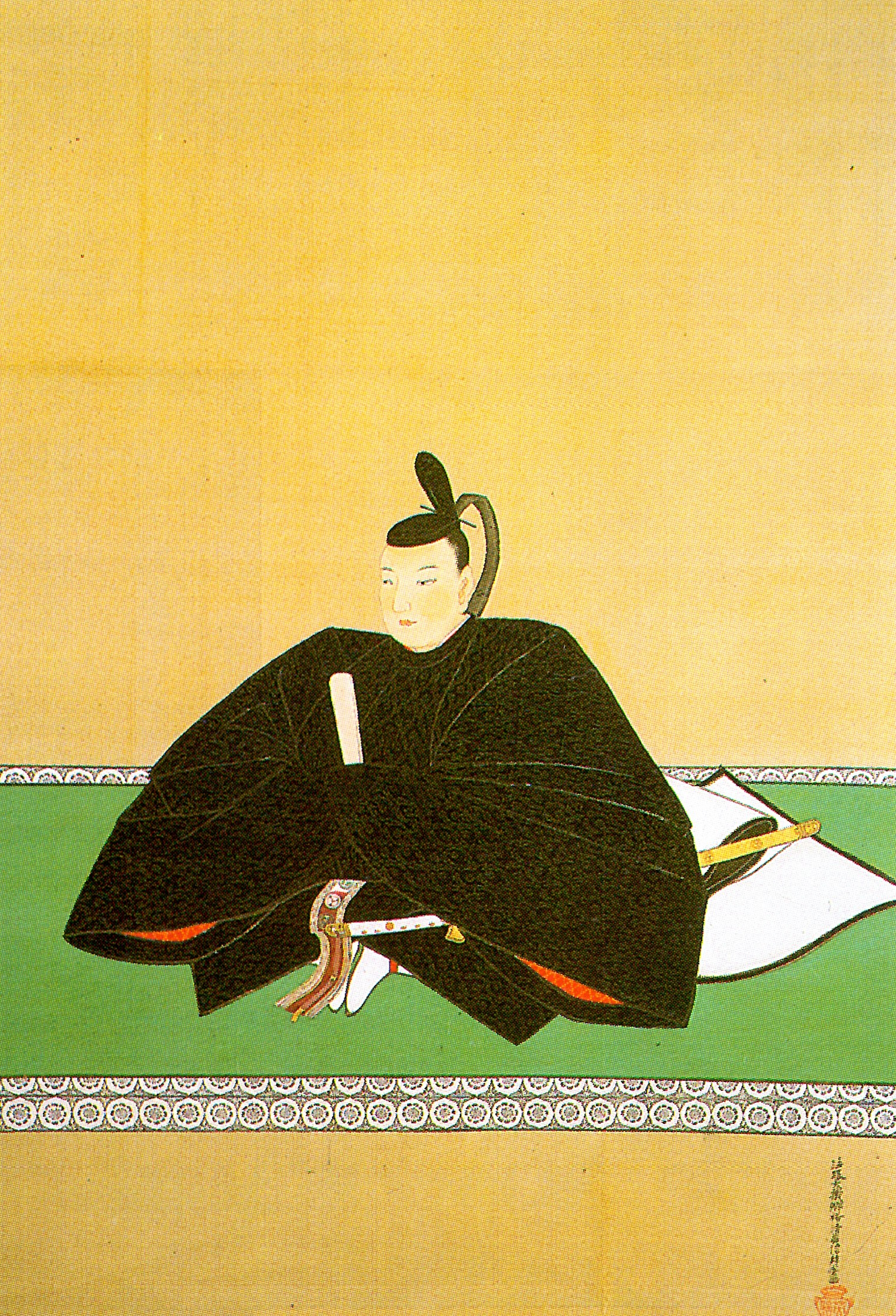 松平容貞の肖像。